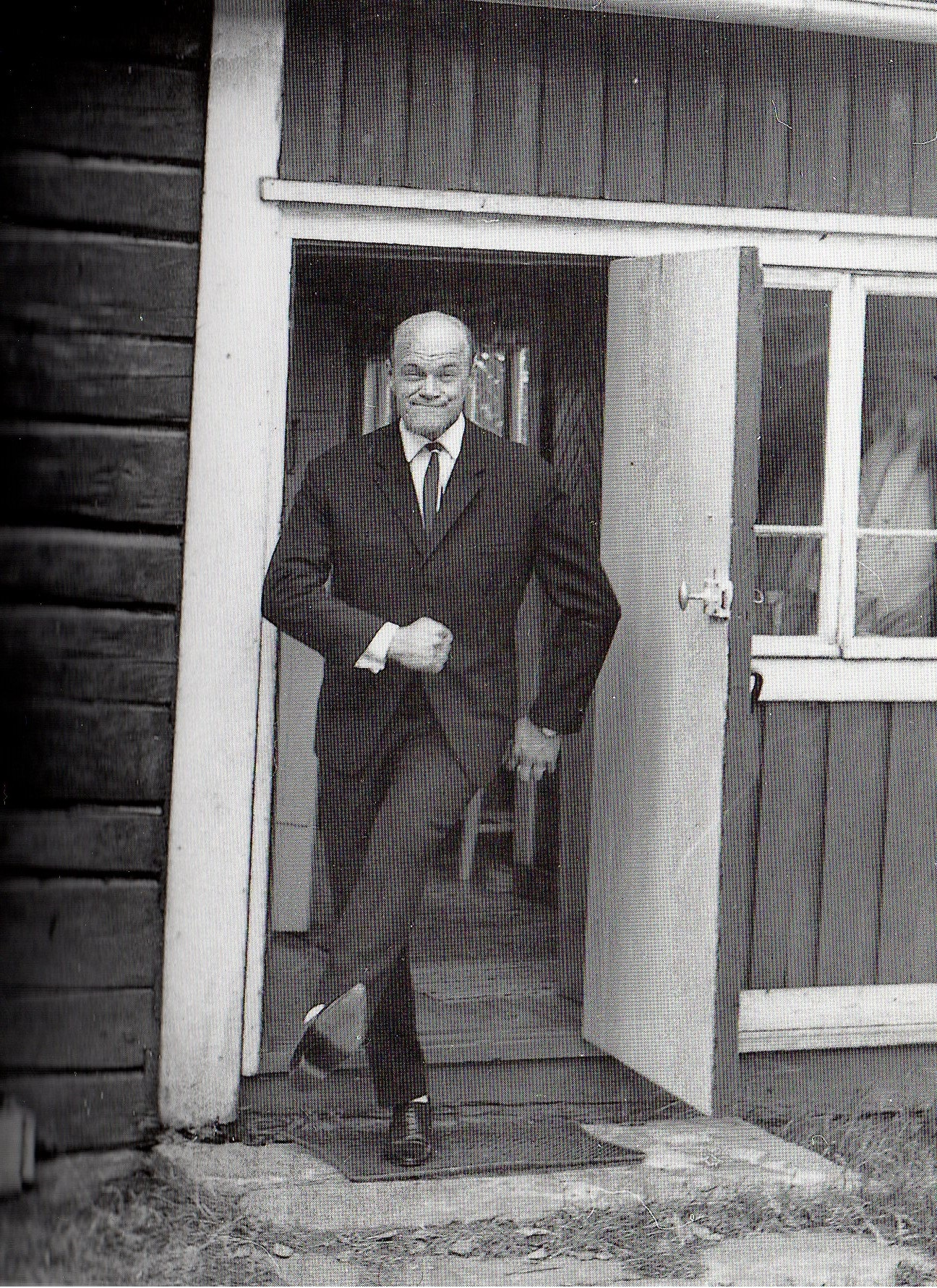 Suomalainen viihdetaiteilija, koomikko, näyttelijä, käsikirjoittaja, elokuvaohjaaja, tuottaja, lauluntekijä ja keksijä Spede Pasanen heinäkuussa 1965 Kuopion Sorsasalossa häittensä aikaan.